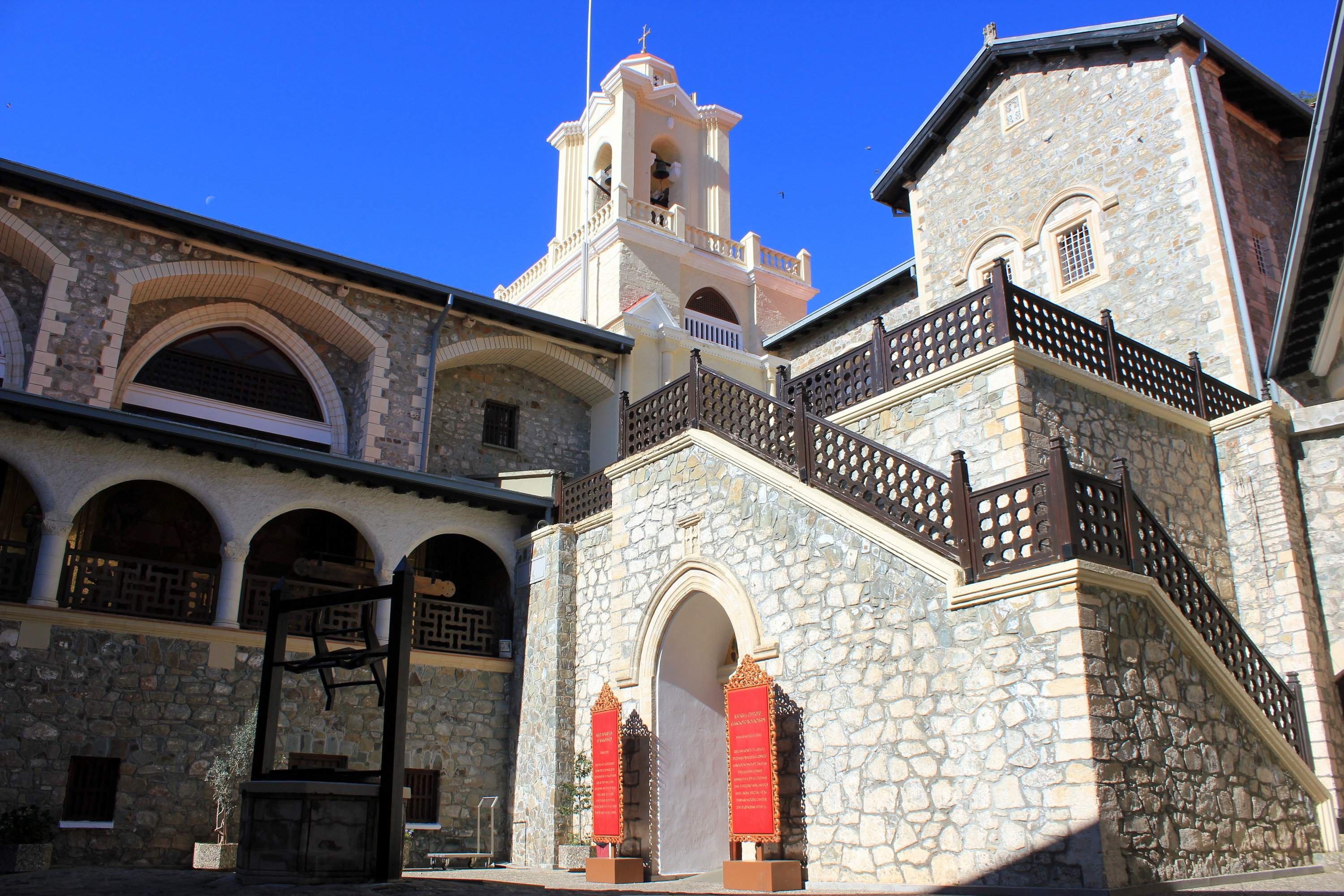 Der kleine Innenhof des Klosters Kykkos, Zypern.